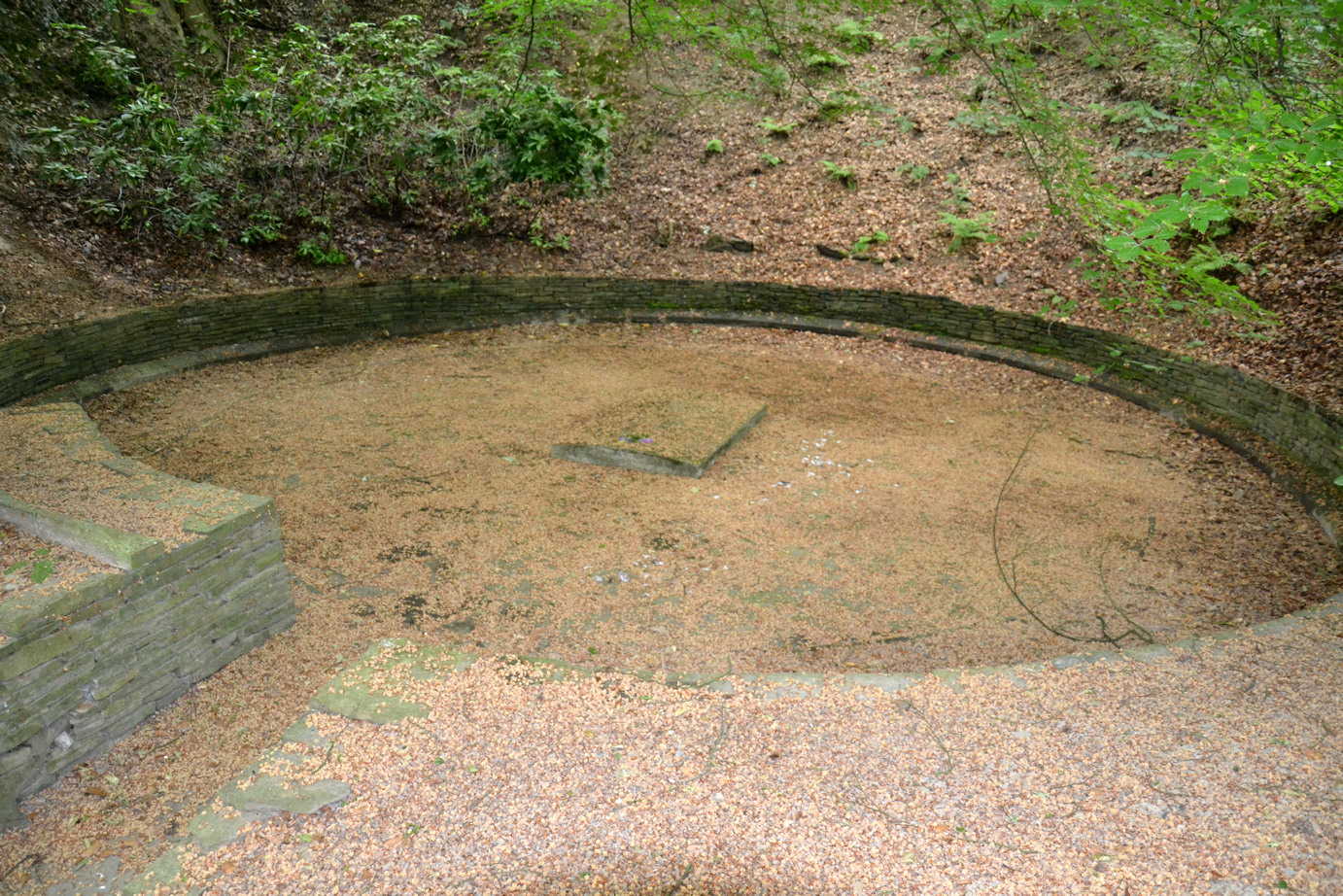 Urenhain auf dem Südwestfriedhof in Essen